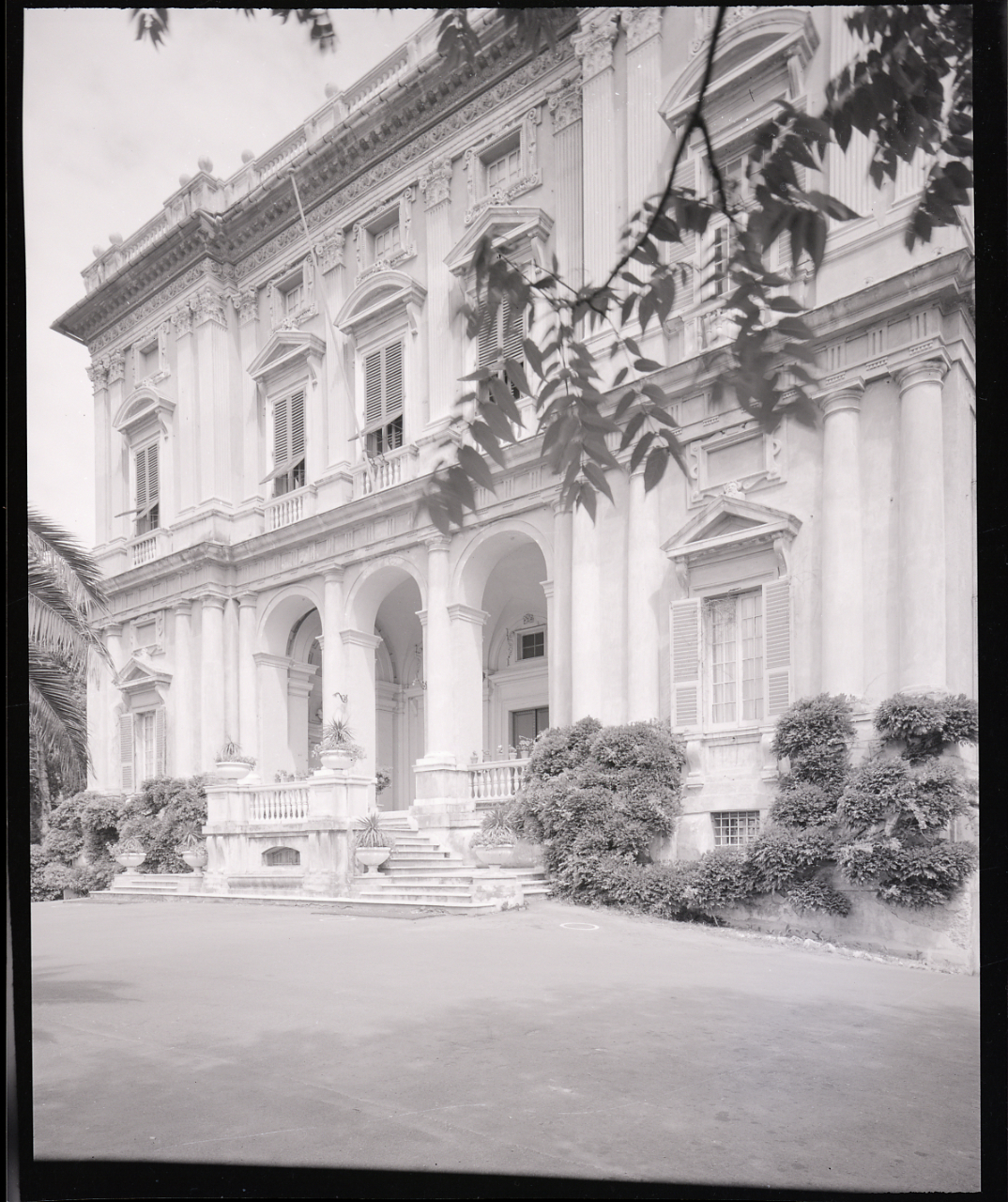 Riviera di Levante. Genova. Albaro. Villa Giustiniani, Cambiaso, ora un'Università. Facoltà di Ingegneria, 1548. Esterni e interni. Servizio fotografico : Genova, 1964 / Paolo Monti. - Buste: 13, Fototipi: 13 : Negativo b/n, gelatina bromuro d'argento/ pellicola ; 10x12. - ((Serie costituita da 13 buste sciolte di negativi identificati con i nn.: 6324, 6325, 6326, 6327, 6328, 6329, 6330, 6331, 6332, 6333, 6334, 6335, 6336. - Il negativo identificato con il numero 46397 è stato realizzato per Zodiac. - Occasione: Documentazione per la pubblicazione: Italia Nostra (a cura di), "Le ville genovesi", catalogo della mostra, Genova 1962, Genova, Comune di Genova, 1967. - Fonte: Monografia di Italia Nostra (a cura di): Le ville genovesi, catalogo della mostra, Genova 1962, Genova, Comune di Genova (1967). - Fonte: Lettera di Paolo Monti: I. Carteggi/ Genova - Enrico (1963-1966), presso Archivio Paolo Monti. Camicia con documenti dattiloscritti e manoscritti vari relativi al lavoro eseguito per Italia Nostra: preventivi, lettere, inventari. - Fonte: Agenda di Paolo Monti: R 1 - Monti/ 1 aprile 1963 - 6 giugno 1964/ 6000-8193 (1963-1964), presso Archivio Paolo Monti